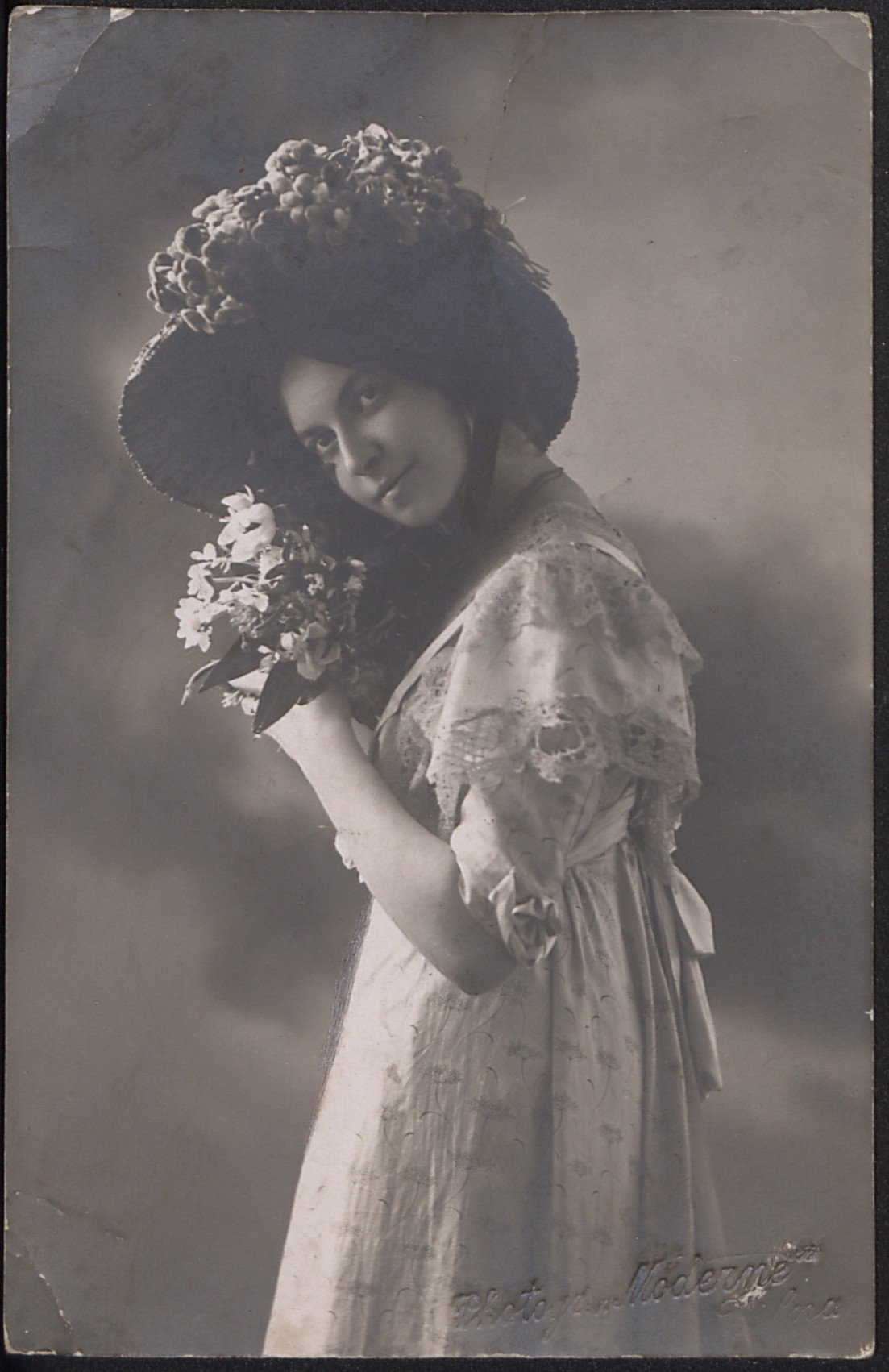 Maria Morozowicz-Szczepkowska, pisarka i aktorka.